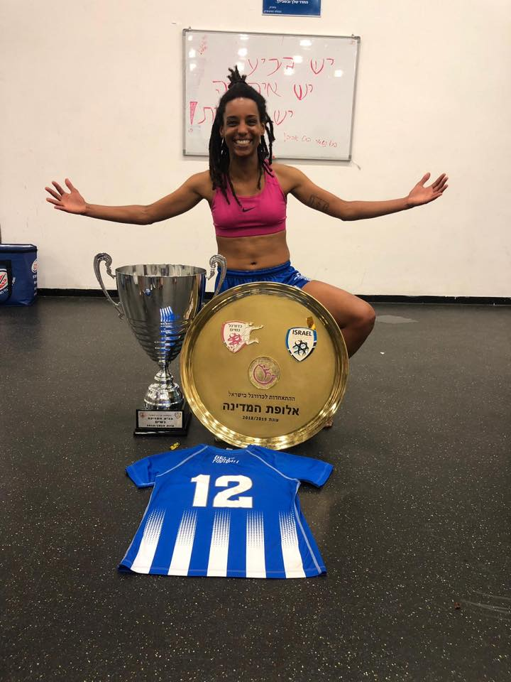 מור אפריים יחד עם צלחת האליפות וגביע המדינה בהם זכתה במדי אס"א תל אביב בעונת 2018/2019